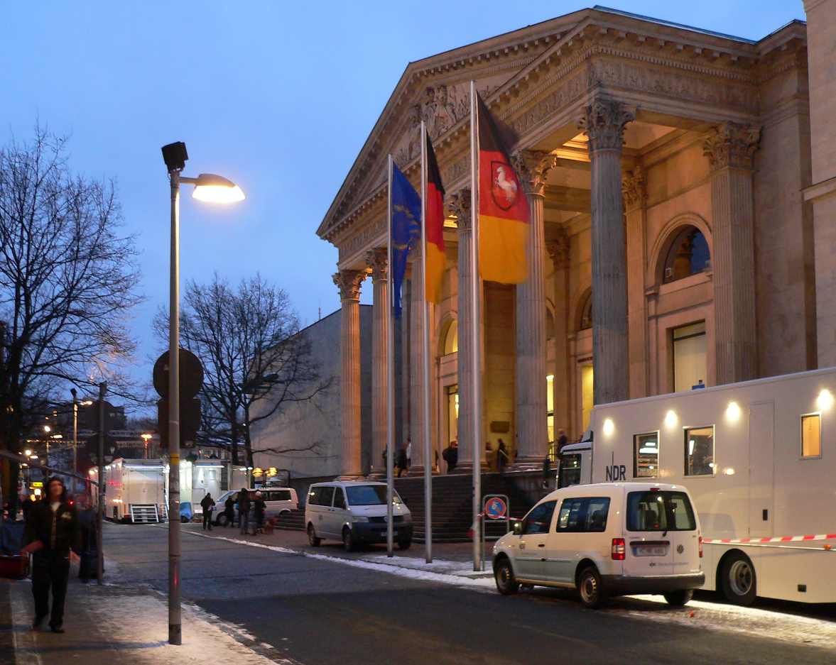 Landtagswahlen Niedersachsen 2013, Übertragungswagen vor dem Landtagsportal